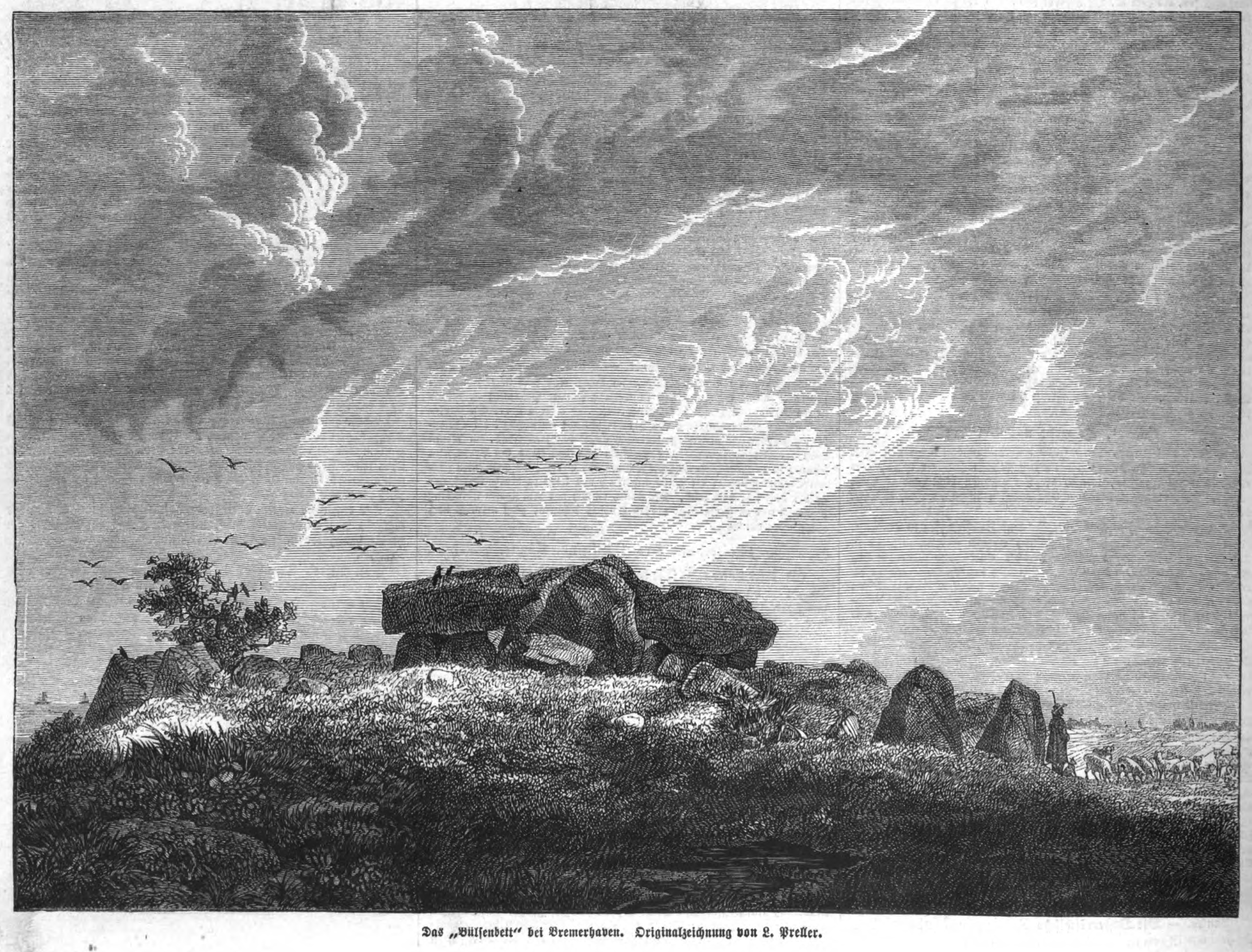 Ansicht des Großsteingrabs Bülzenbett bei Bremerhaven, 1866.